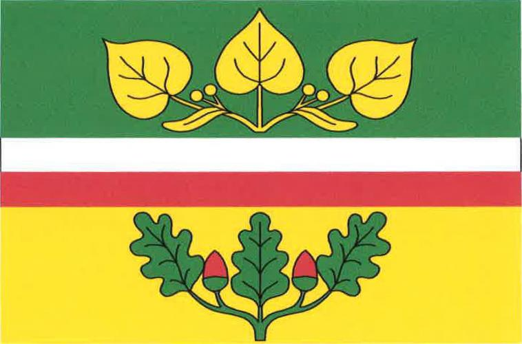 Vlajka obce Zeleneč v okrese Praha-východ, Česká Republika.